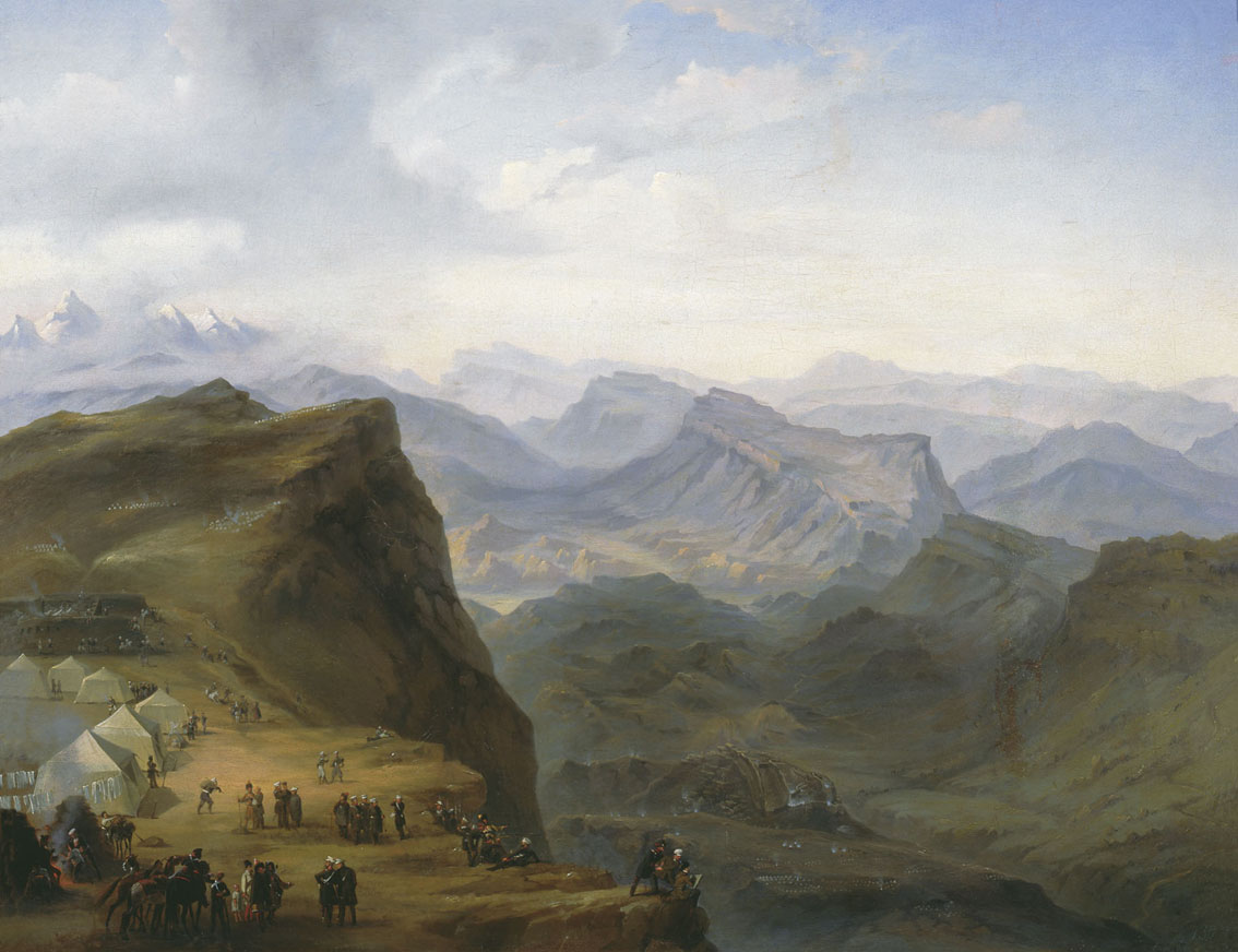 Русский лагерь под Гунибом. Холст, масло. Дагестанский музей изобразительных искусств имени П.С. Гамзатовой